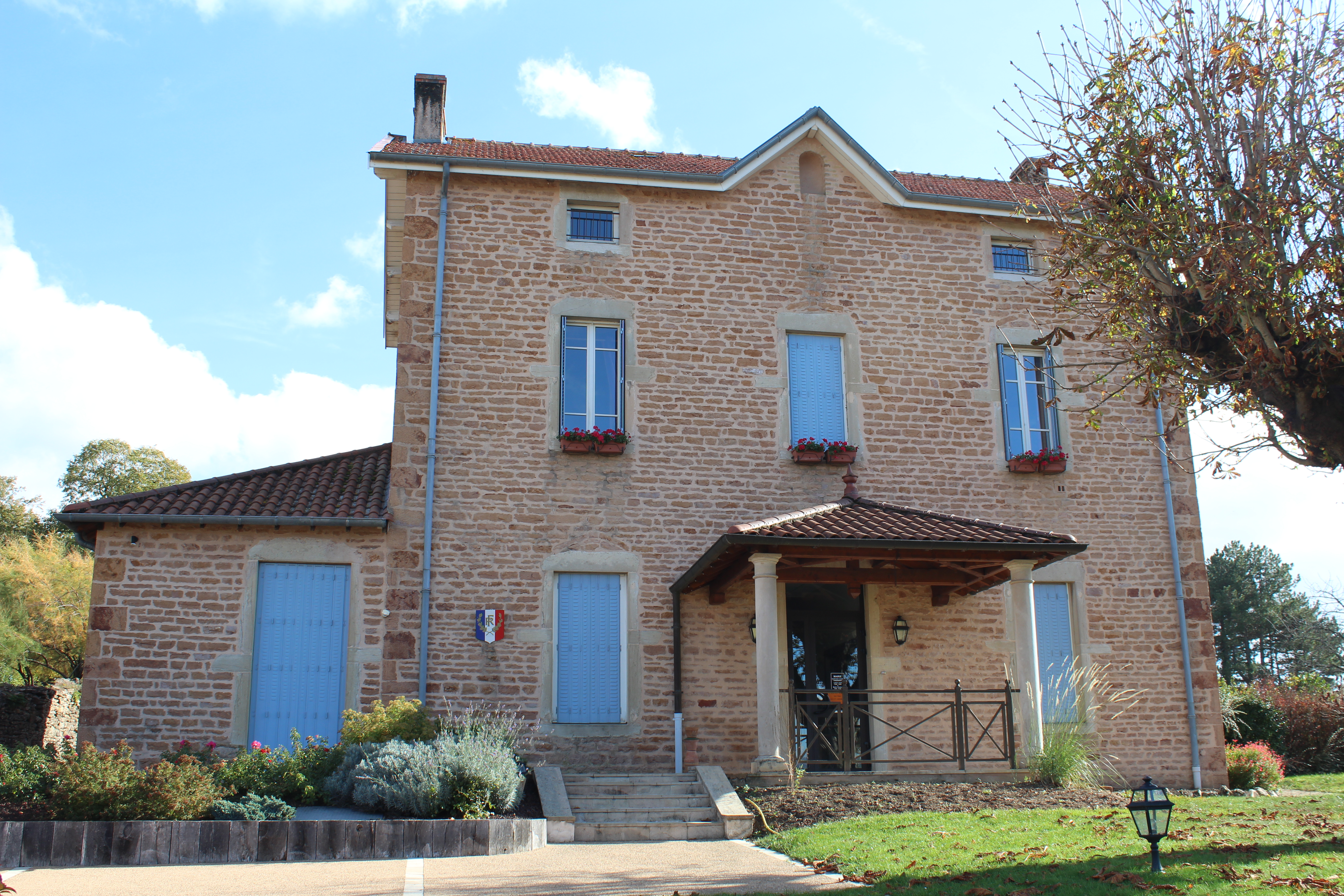 Mairie de Chevagny-les-Chevrières.